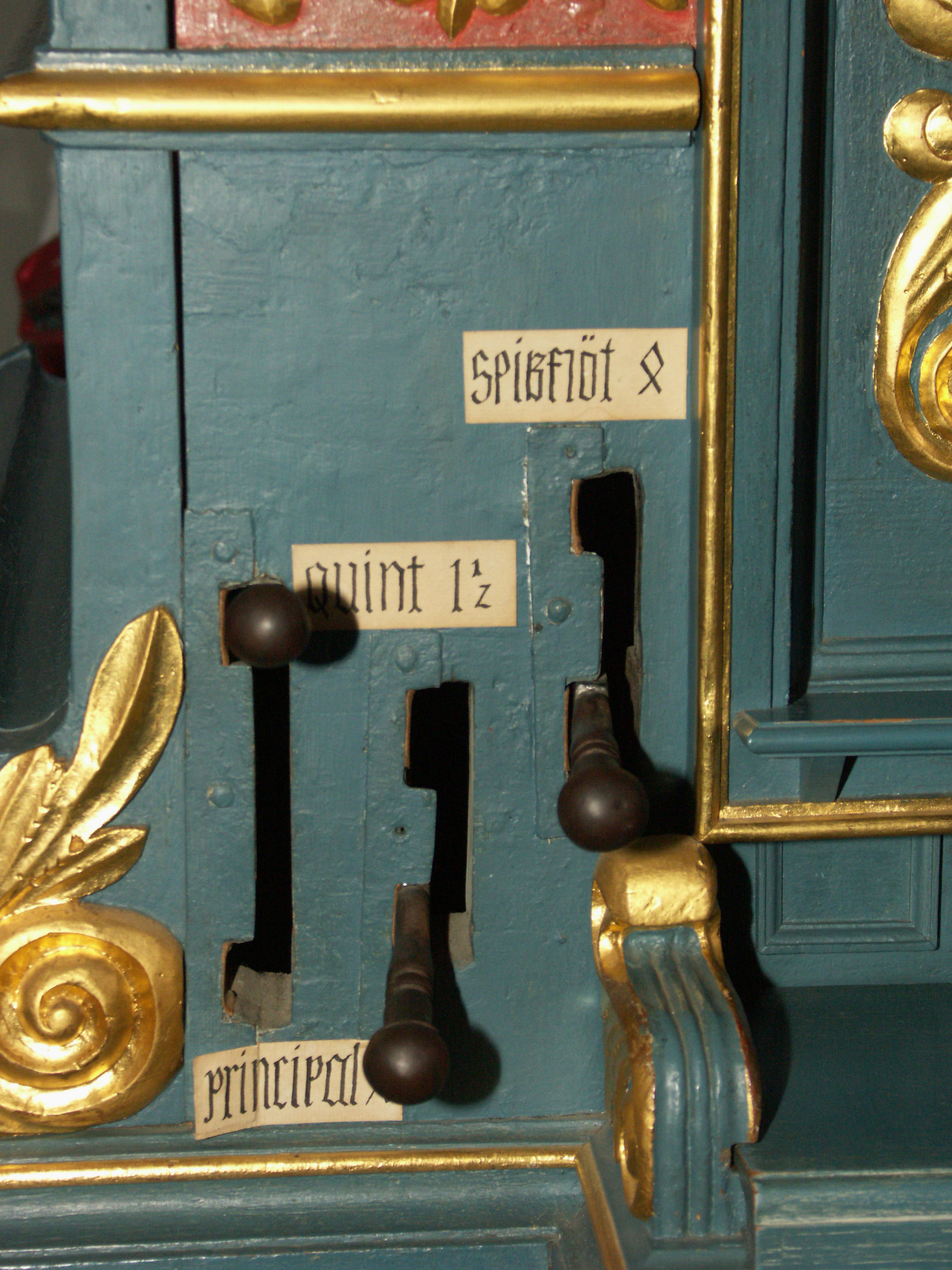 Orgel in Worfelden, Ev. Kirche, Registerzüge linke